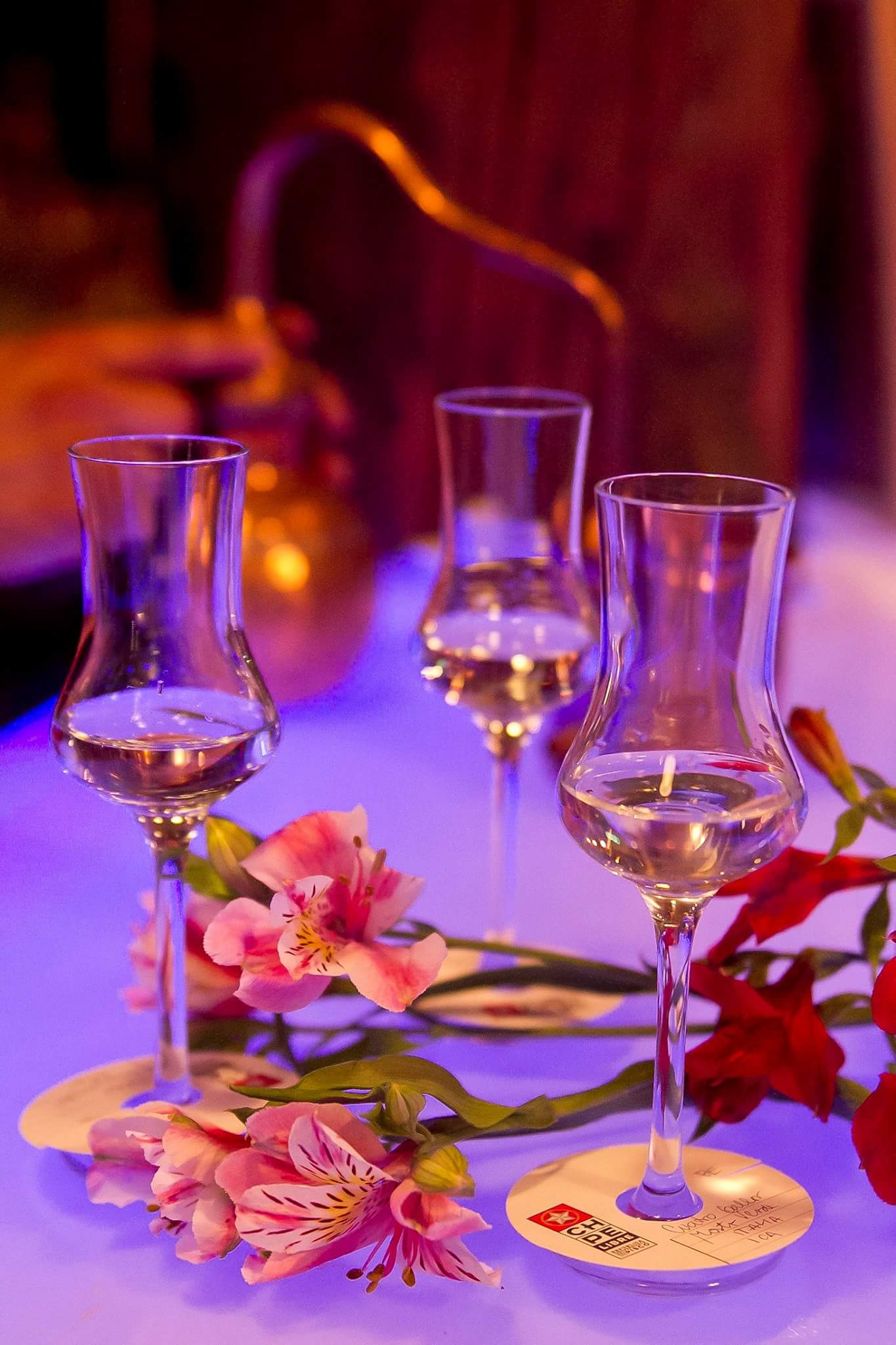 Copas de Pisco con astromelias en el bar Chipe libre Santiago de Chile